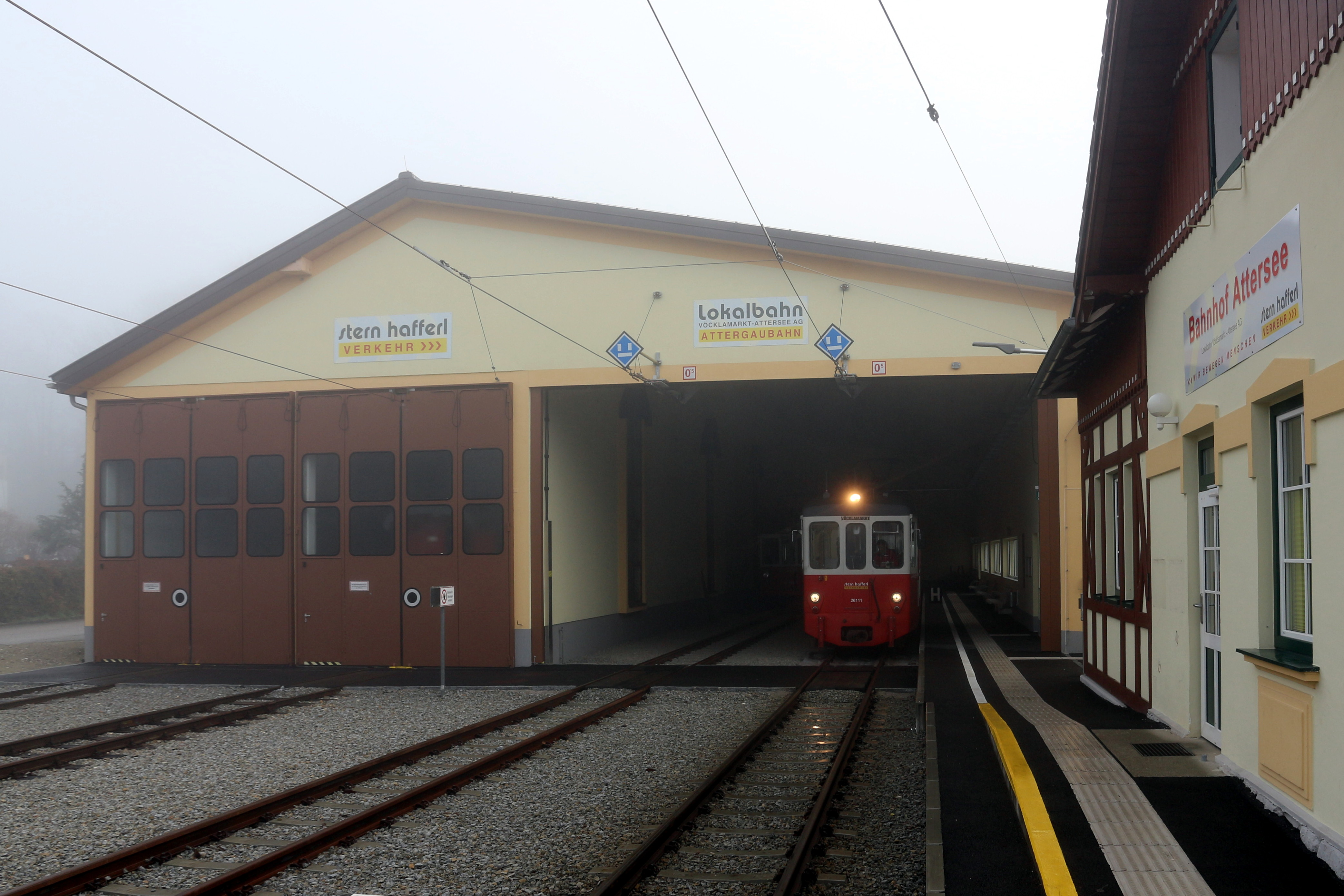 Im Jahr 2015 wurde die Remise am Bahnhof Attersee erweitert